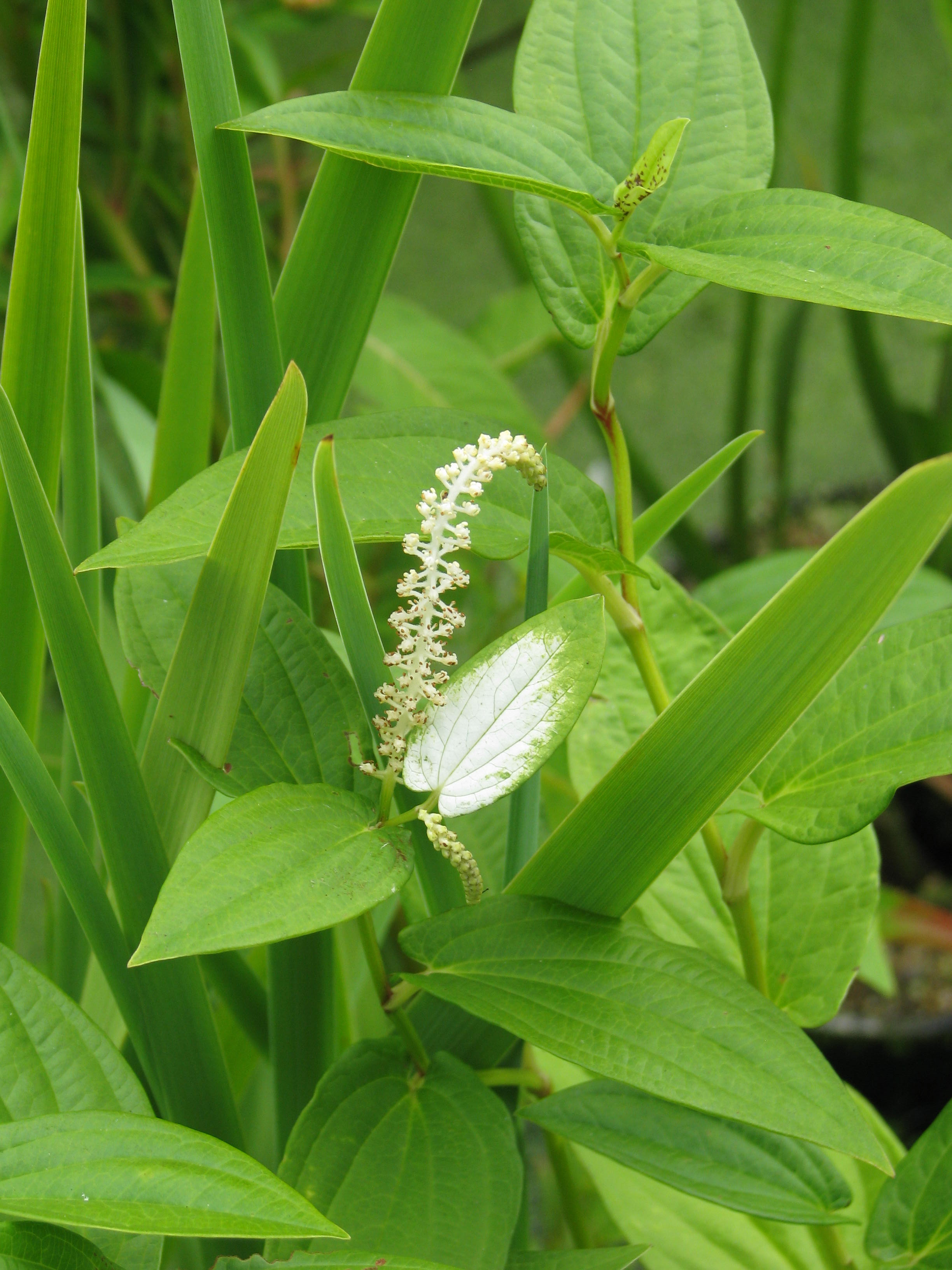 Saururus chinensis